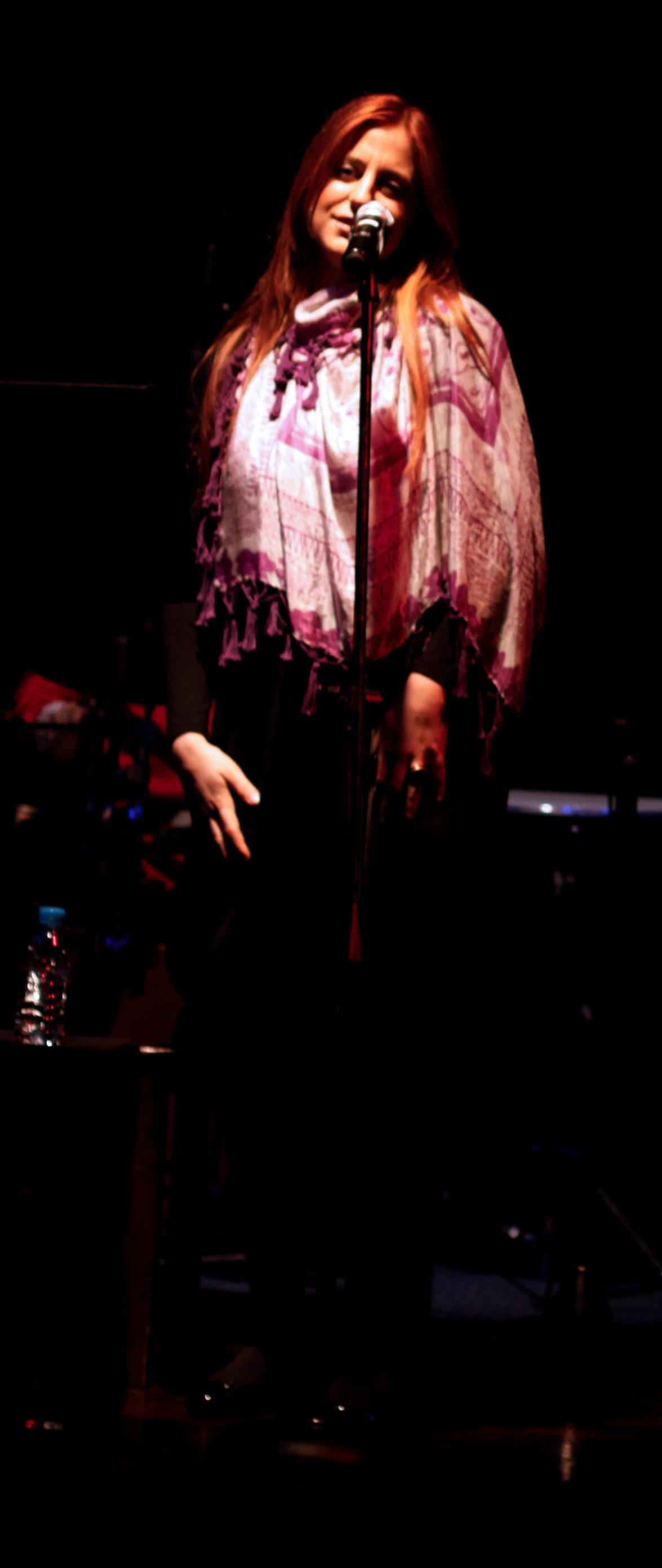 İncesaz konserinde Dilek Türkan